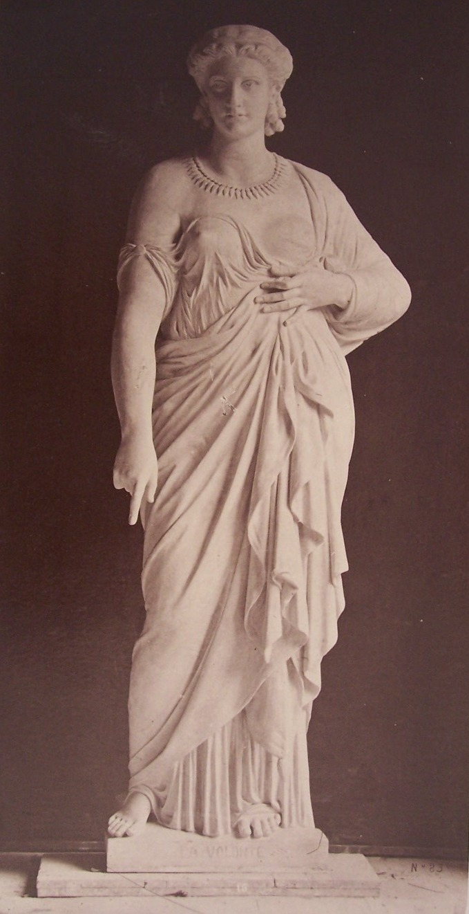 Le Nouvel Opéra de Paris. Statues décoratives (35 planches) Statues dans le Grand Foyer: Planche 23: La Volonté (par Janson)